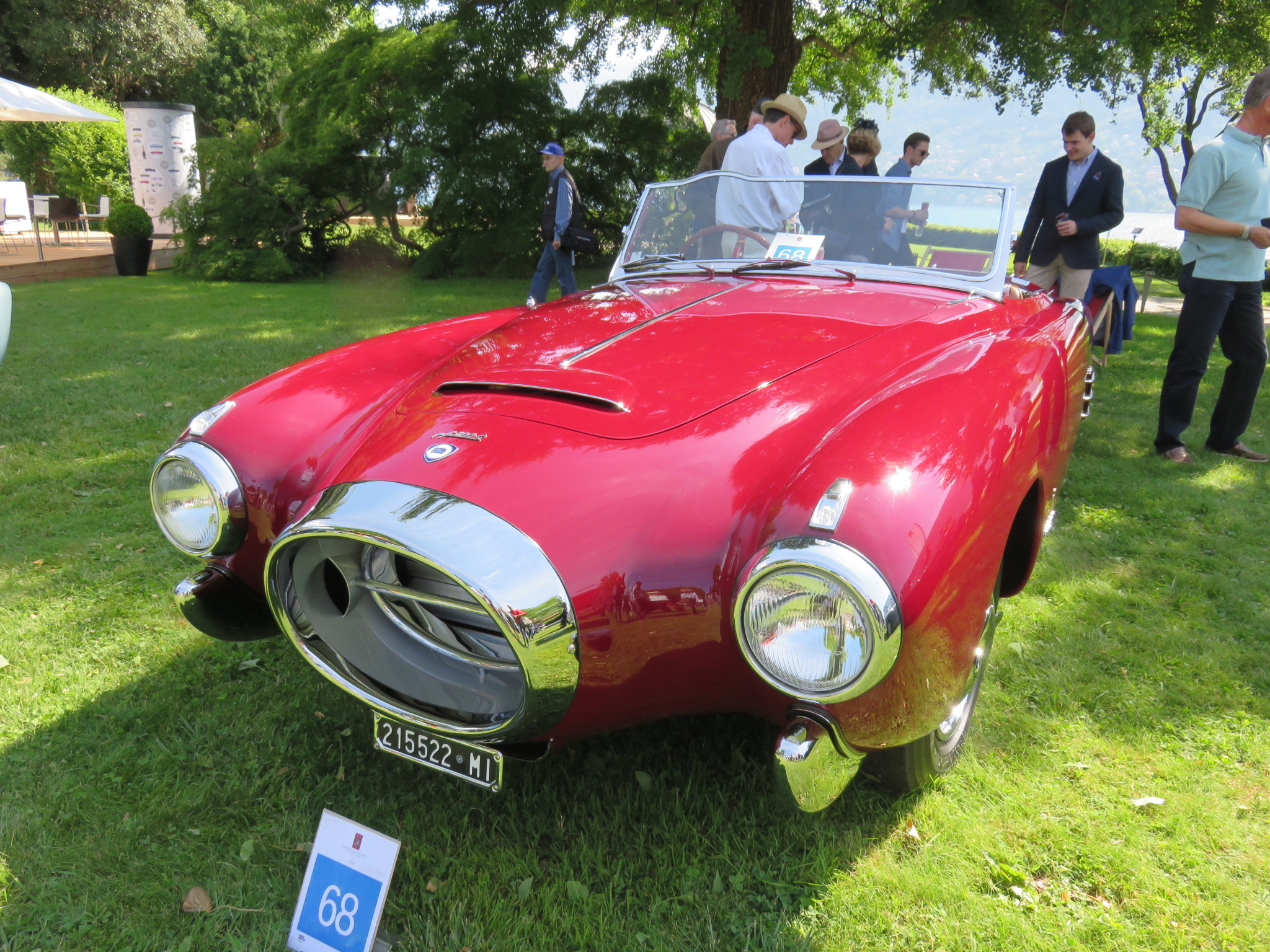 Lancia Aurelia B52, 6 cylindres, spider Pinin Farina, 1953, concours d'élégance Villa d'Este 2015